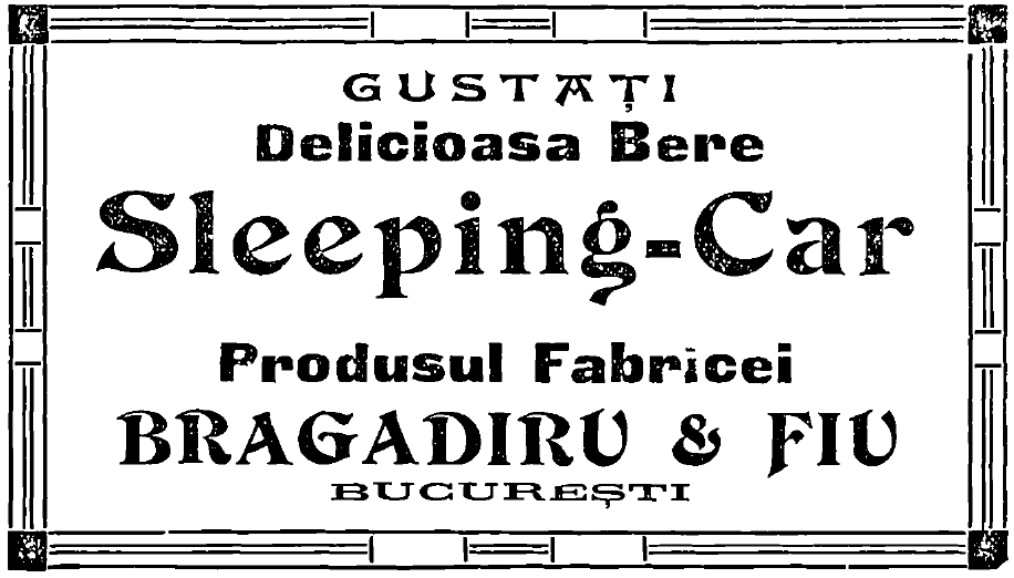 Sursa - "Bucureştii", Anuarul Ilustrat al Capitalei pe anul 1910, Tipografia Horia Carp & Marinescu, Bucureşti, 1910 Restricţii - Fără restricţii datorită vechimii (peste 100 de ani). Imaginea a fost în domeniul public încă de la publicare (anul 1910).